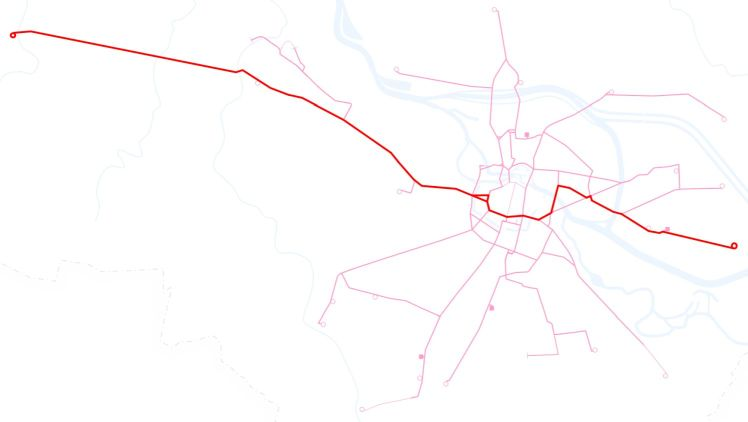 Poglądowa mapka przebiegu linii tramwajowej 10 we Wrocławiu.